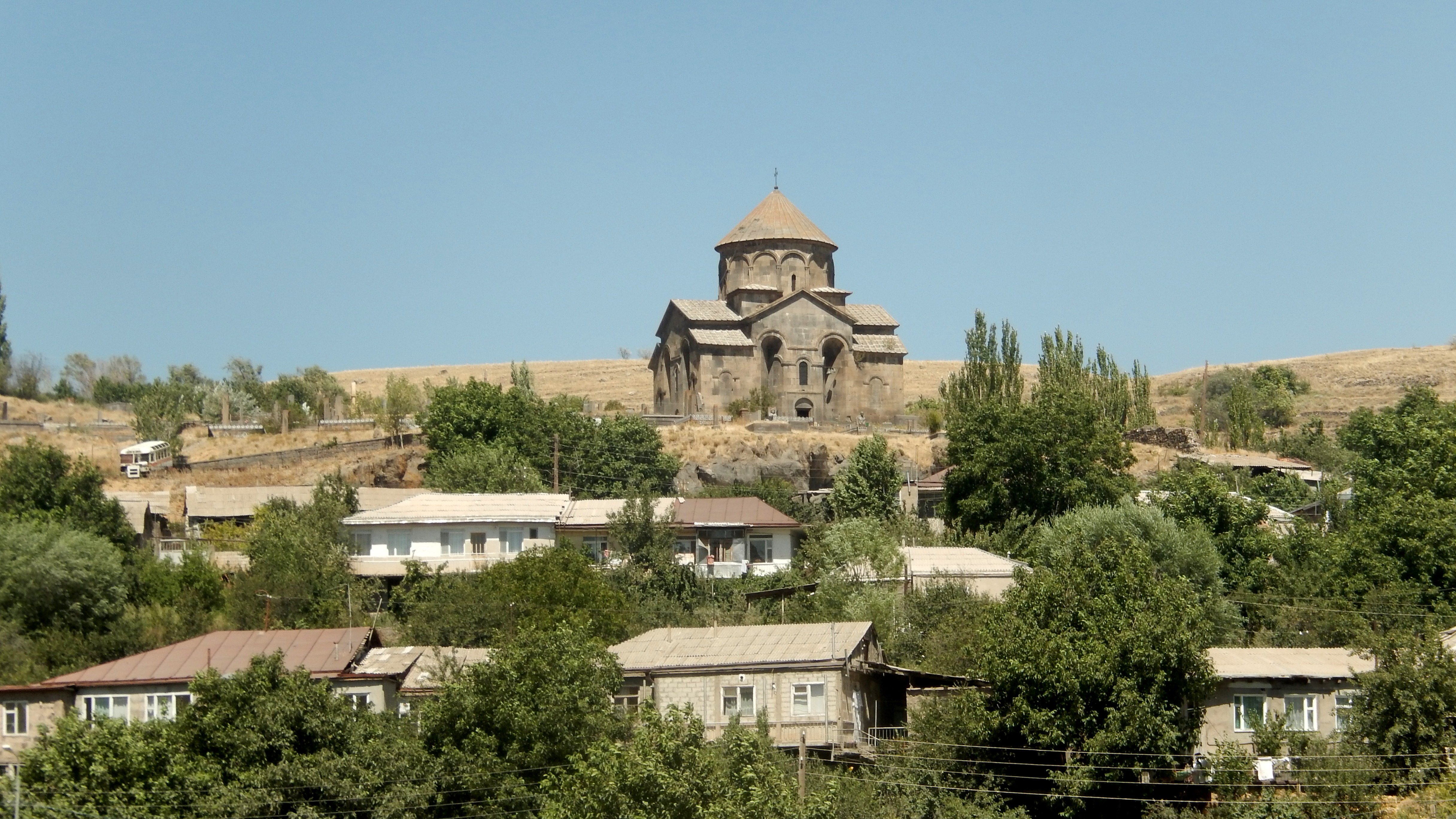 Եկեղեցի Սբ. Հովհաննես, Սիսիան 6/14